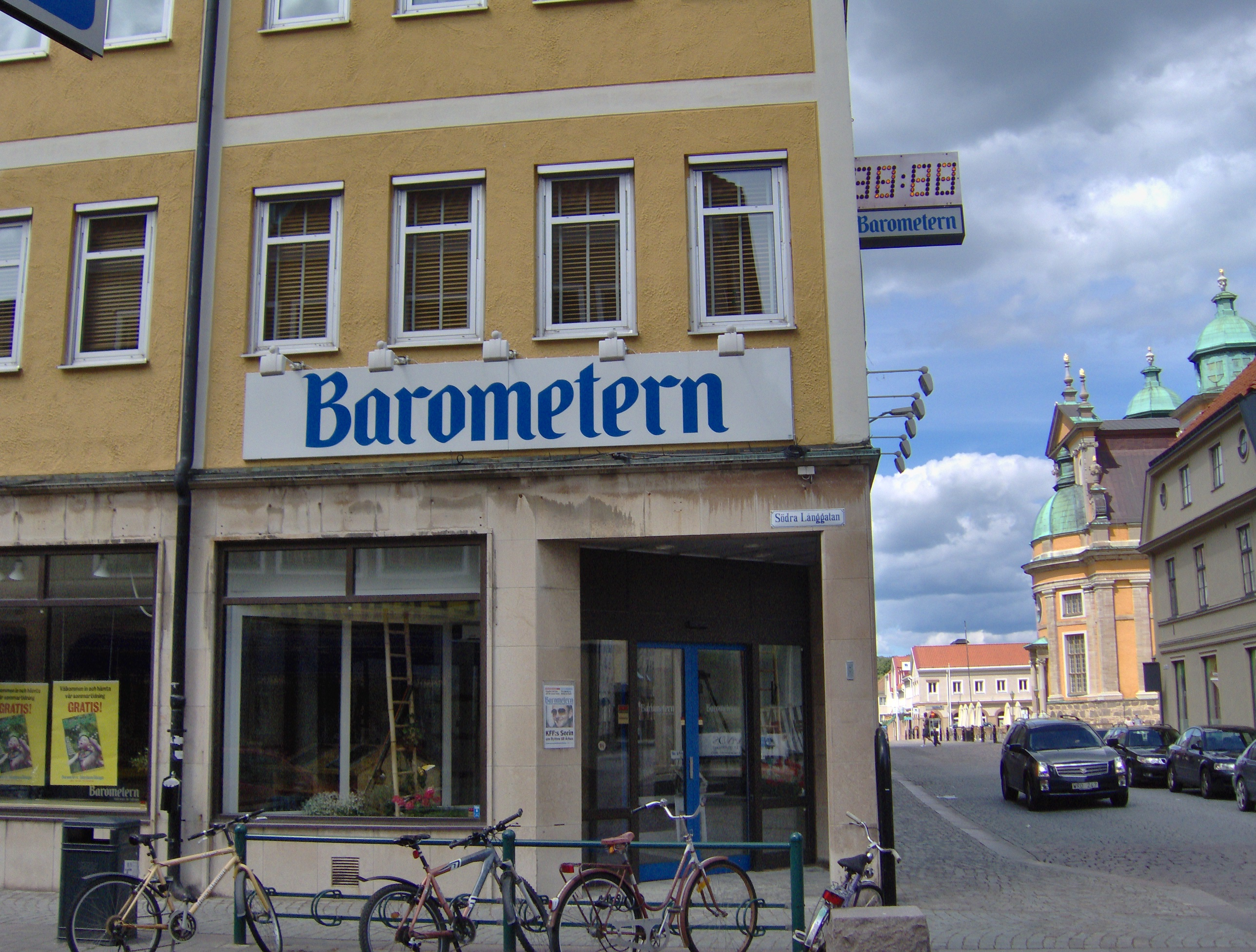 Hpim0425.Jpg